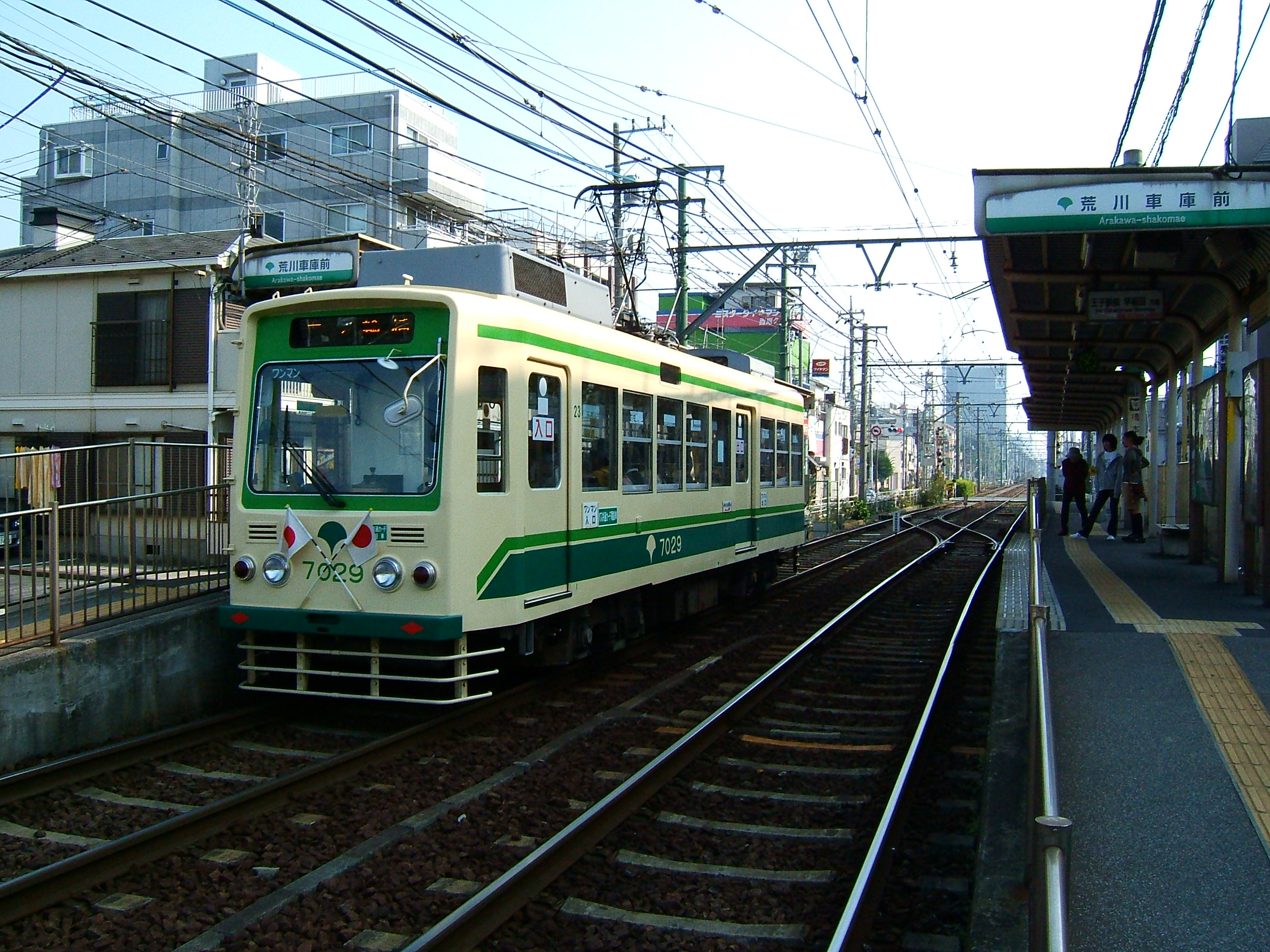 Arakawa tram